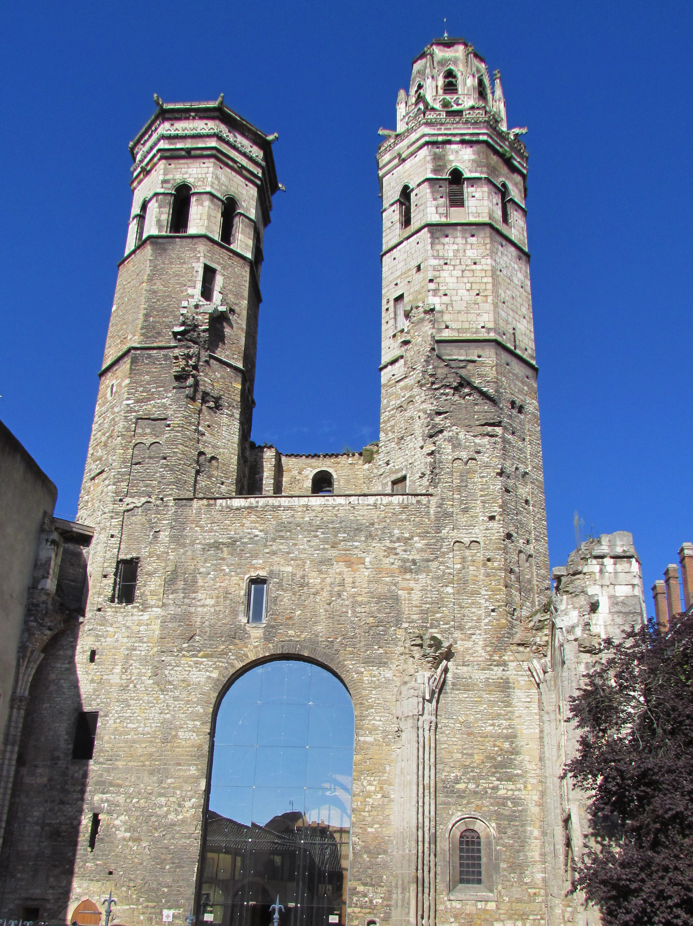 Vestiges de l'ancienne cathédrale Saint-Vincent